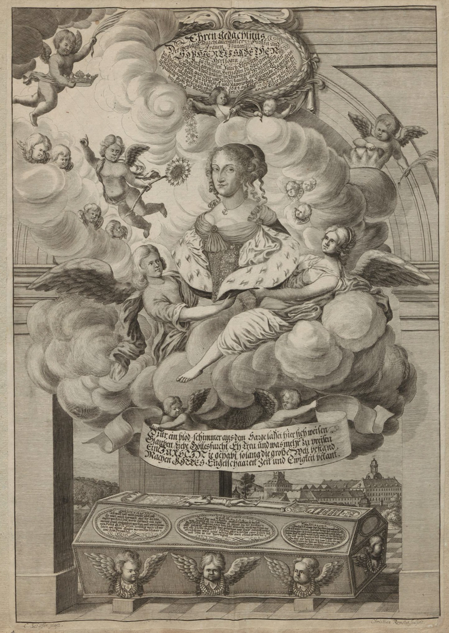 Grafik aus dem Klebeband Nr. 16 („Leichbegängnisse“) der Fürstlich Waldeckschen Hofbibliothek Arolsen Motiv: Ehrengedächtnis für Sophie Elisabeth von Schleswig-Holstein-Sonderburg-Wiesenburg († 1684), Witwe des Herzogs Moritz von Sachsen-Zeitz, mit Sarkophag und Ansicht des Schlosses Moritzburg in Zeitz